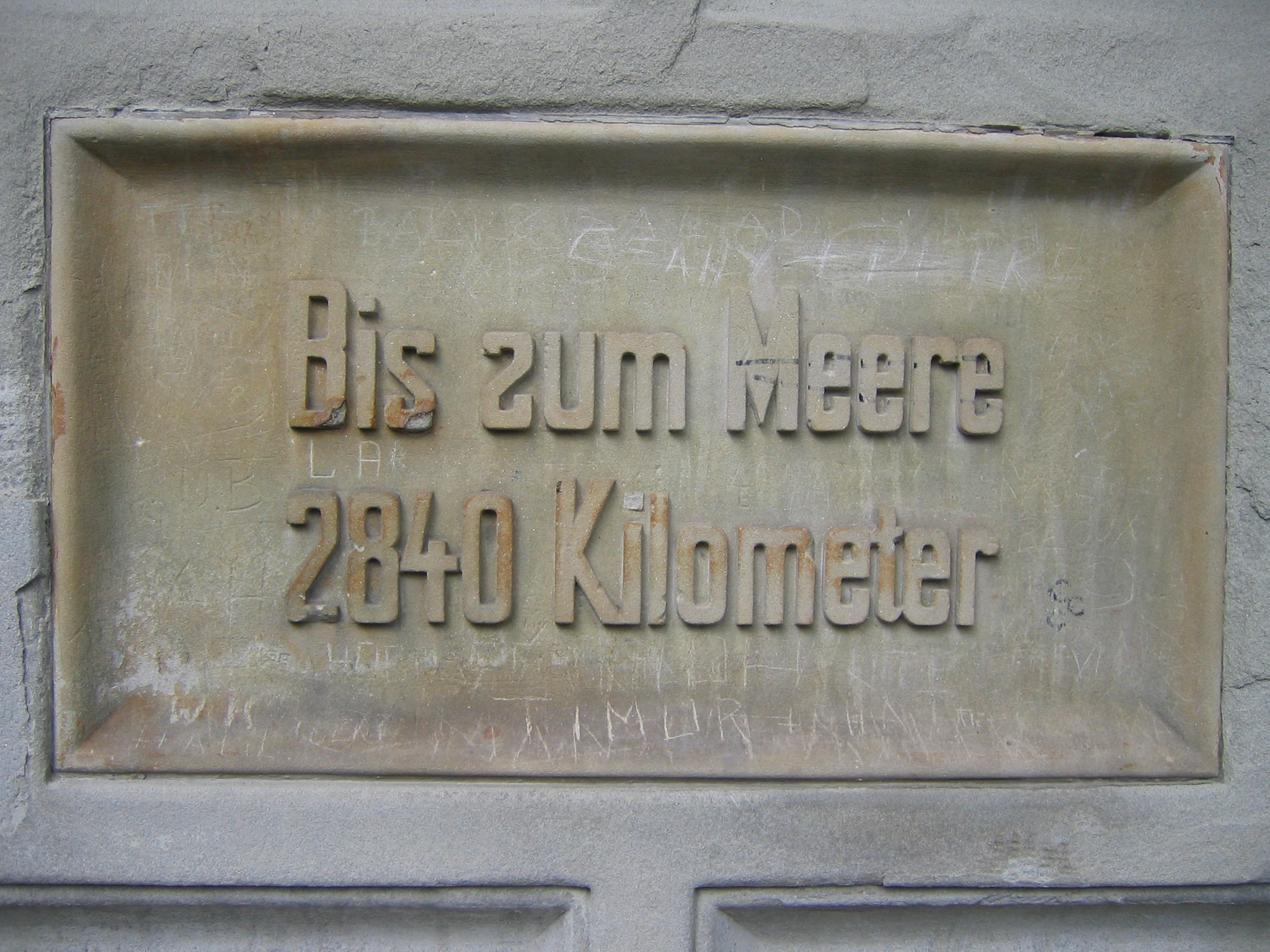 Donauquelle in Donaueschingen